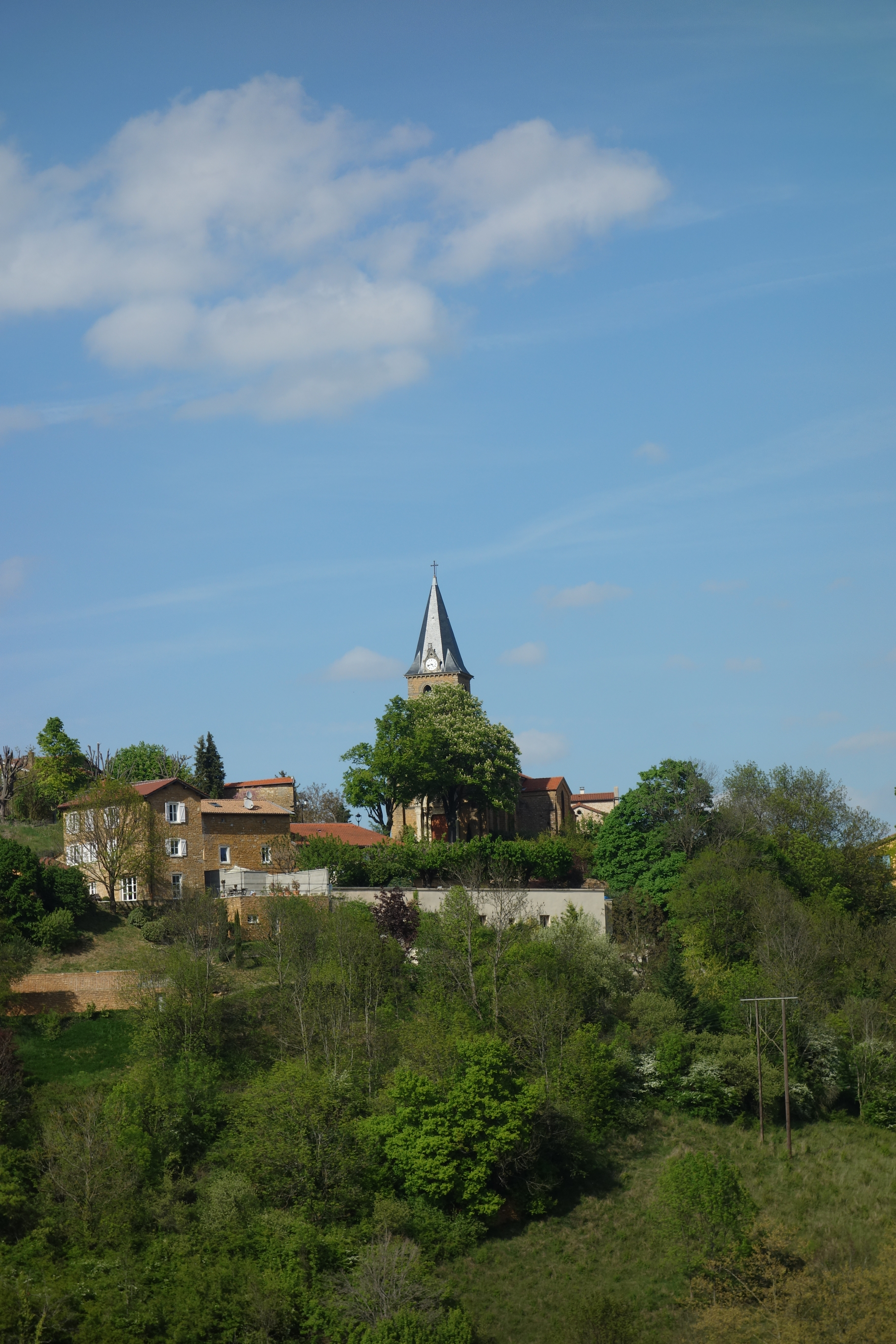 Village de Poleymieux au Mont d'Or